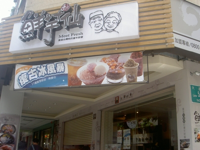 鮮芋仙大直店